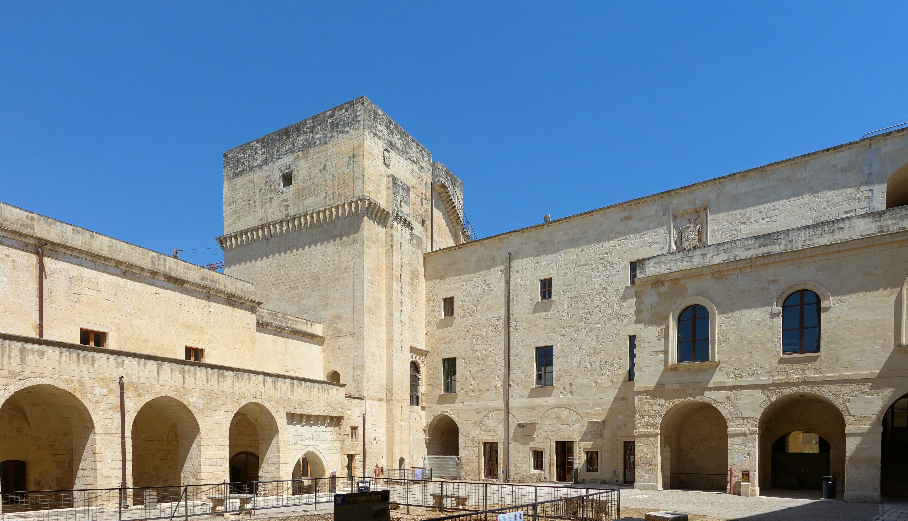 Castello Carlo V This is a photo of a monument which is part of cultural heritage of Italy.